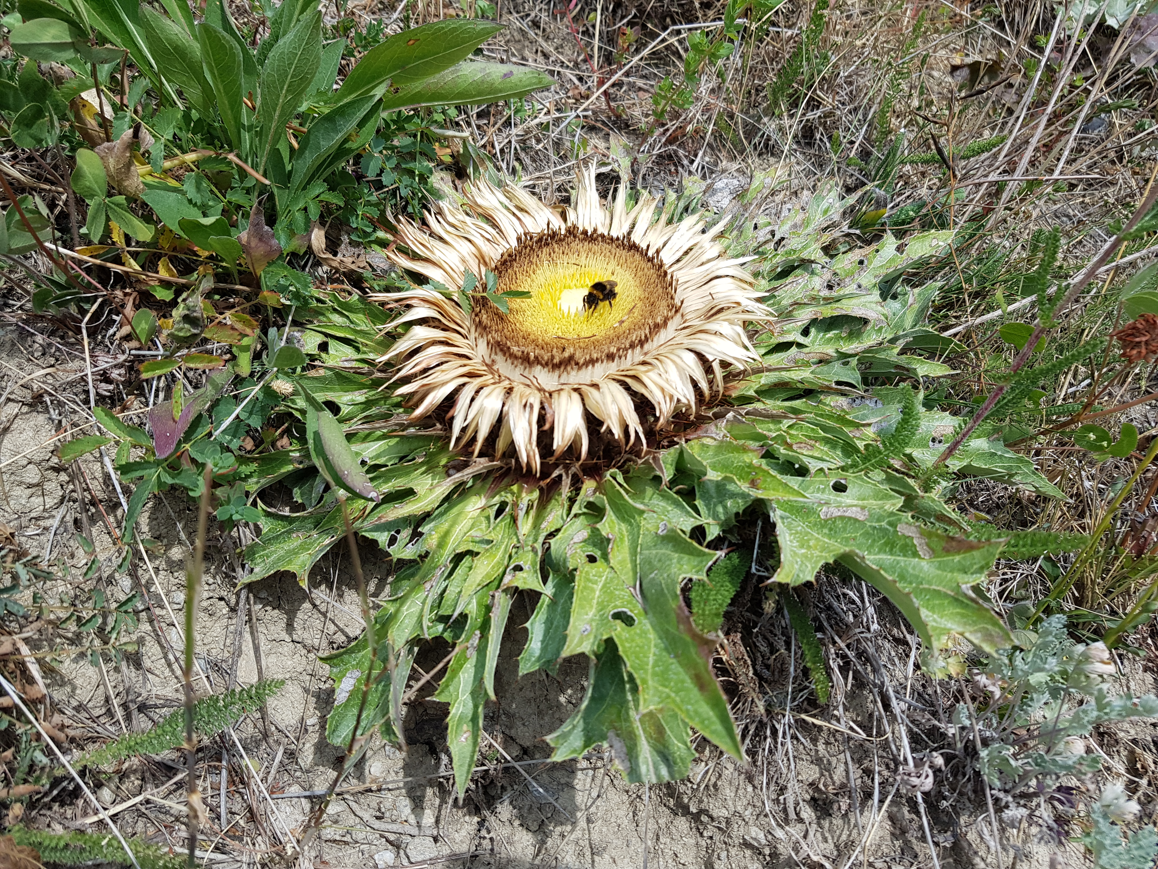 Carline à feuilles d'Acanthe [Queyras, Alpes]